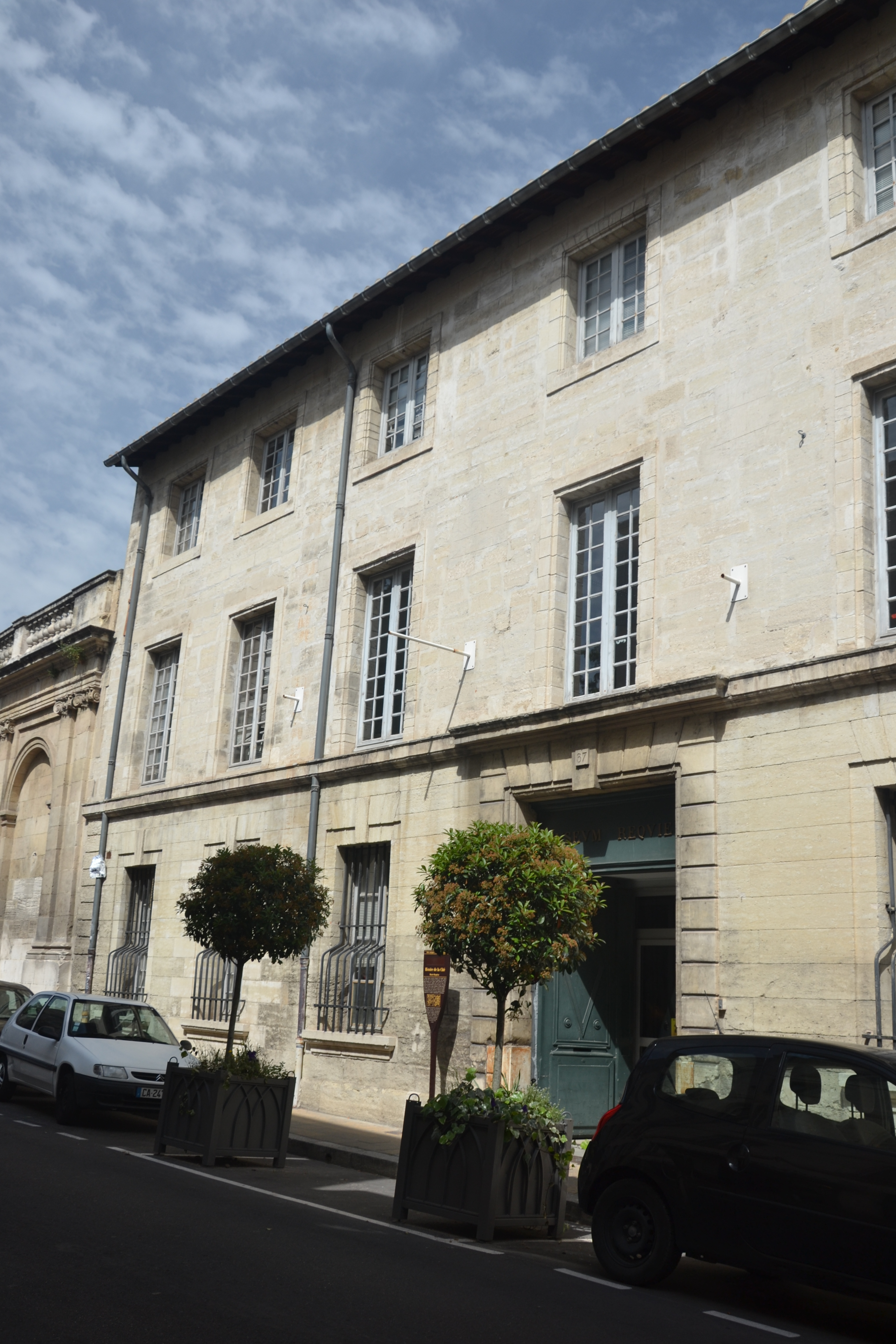 façade du musée Réquien à Avignon